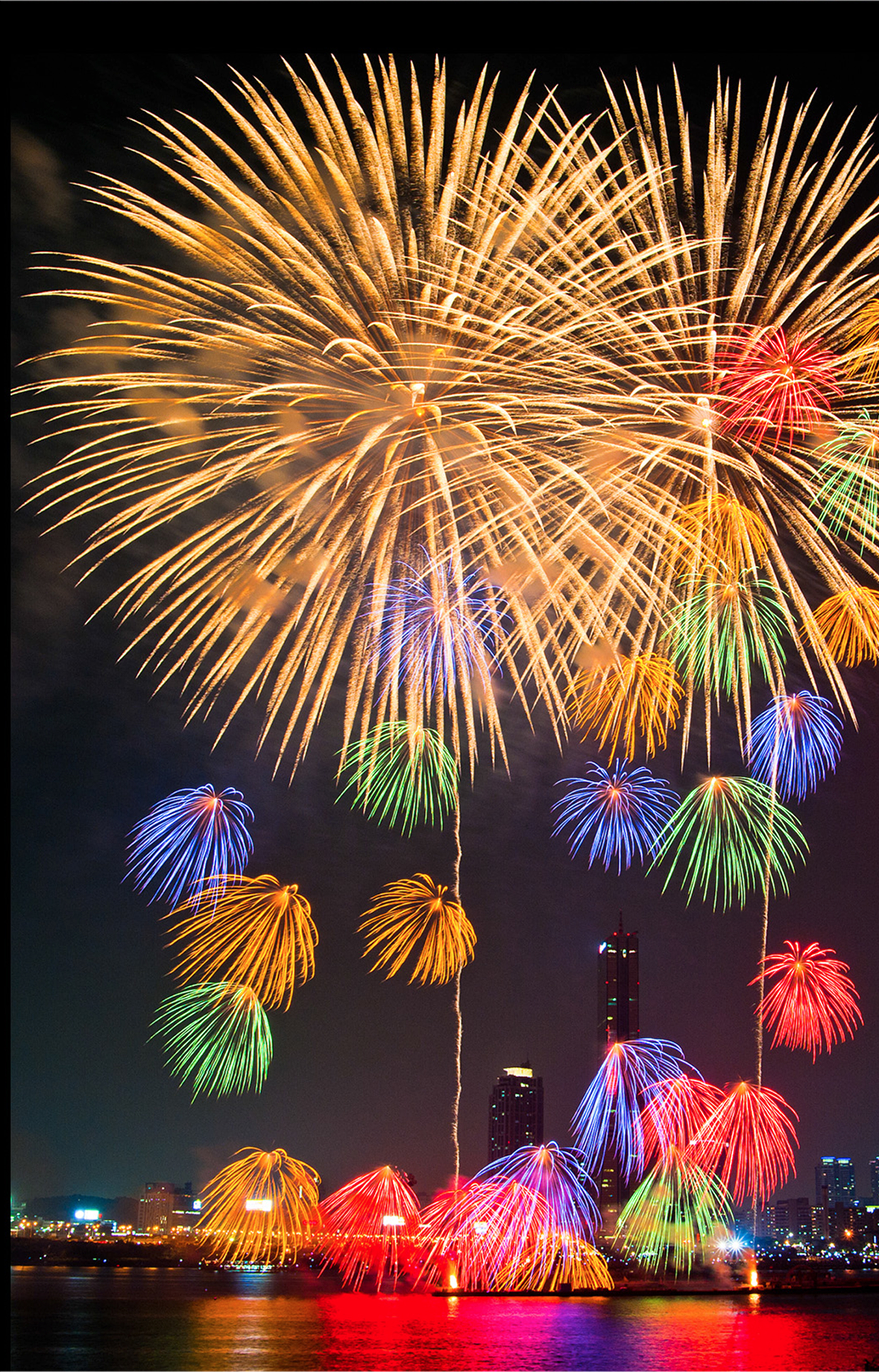 Photos of Seoul Metropolitan Fire & Disaster Headquarters